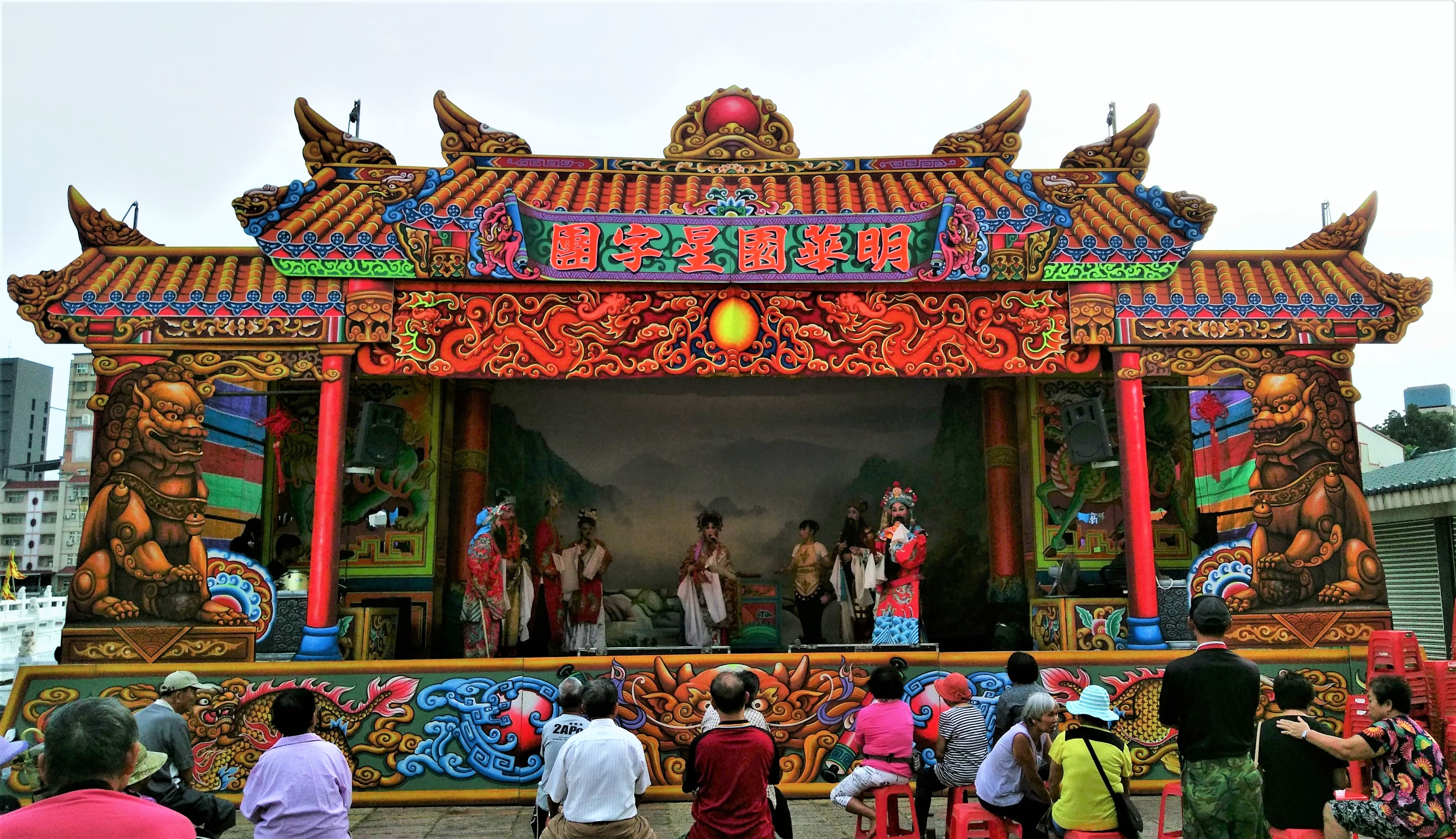 中文（台灣）: 明華園星字團演出